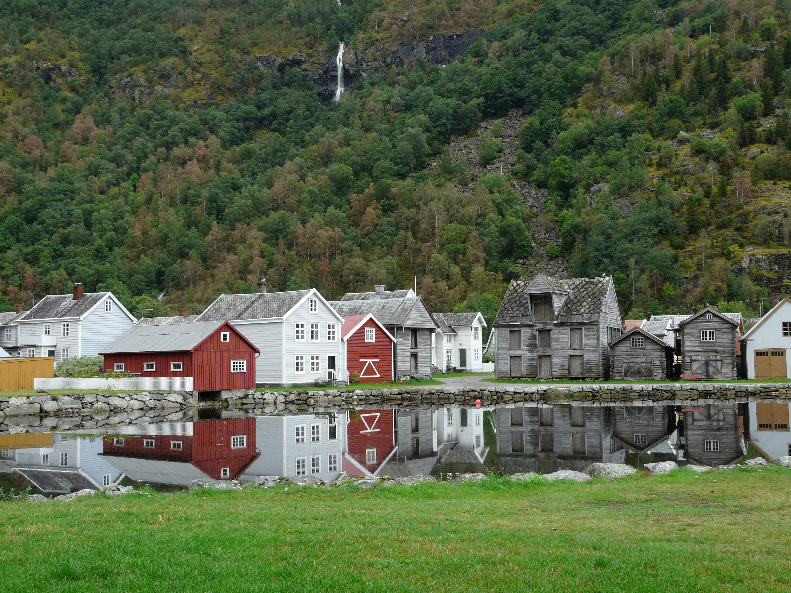 Huizen in Laerdal